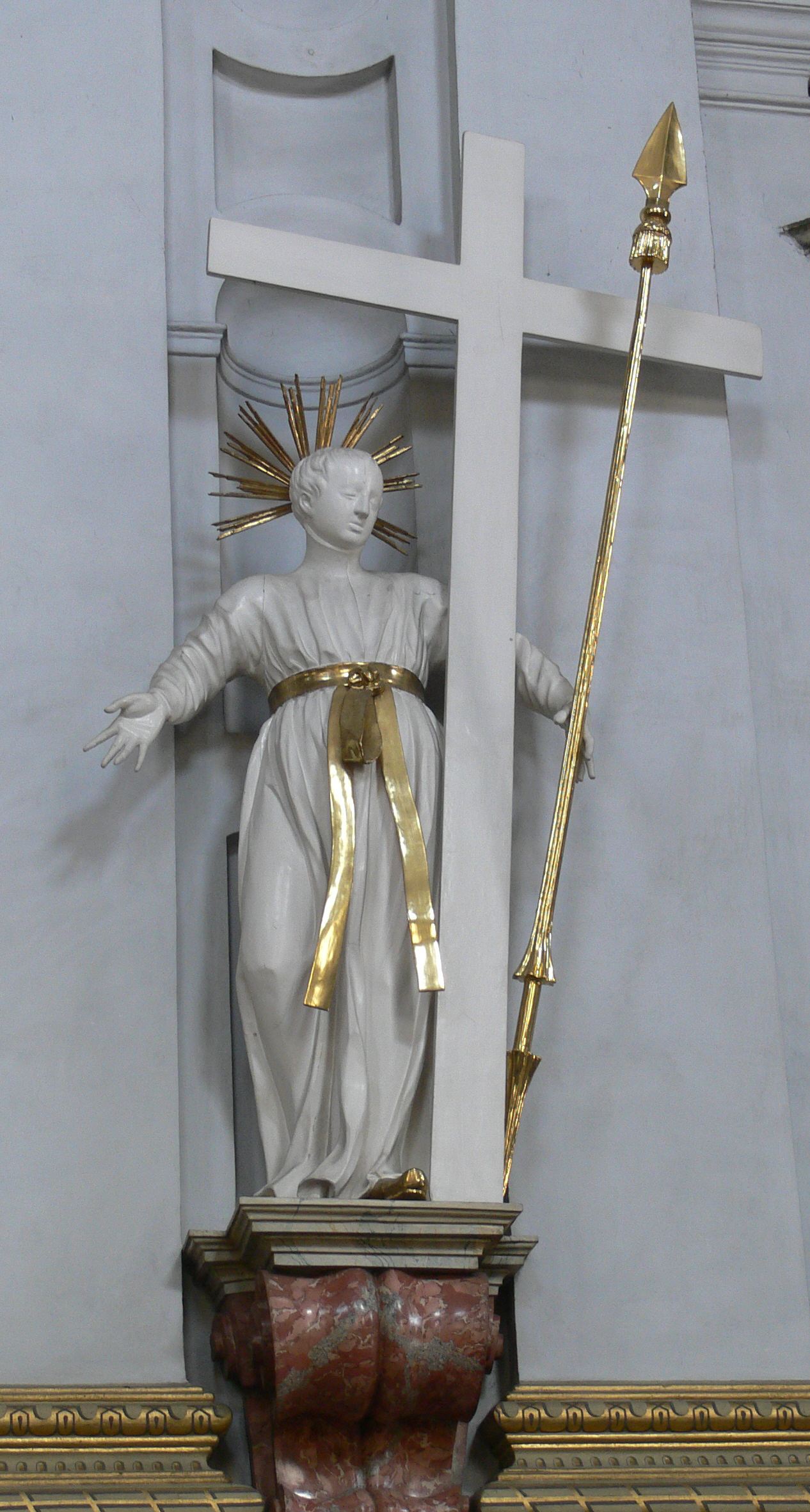 Pfarrkirche St. Martin, Bamberg Figur "Jakob Chisai" von Johannes Bitterich